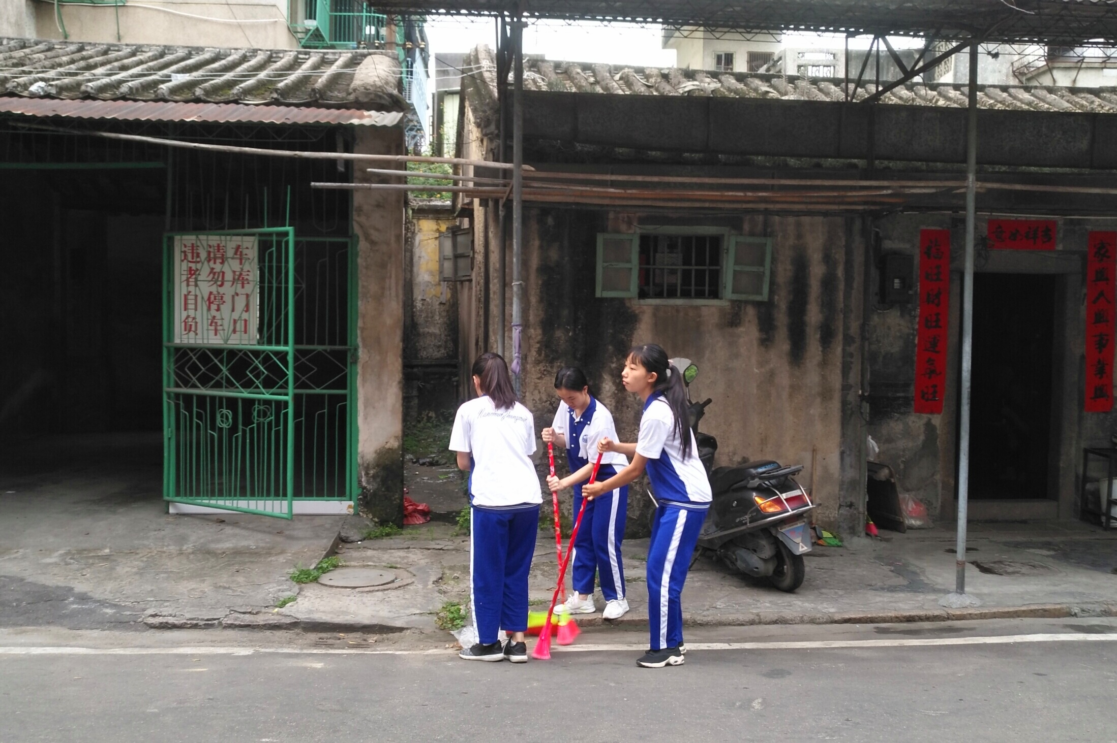 2019年4月29日下午，潮州市南春中学学生在南春路开展义务劳动，平成最后的大扫除。图为正在打扫卫生的三位女学生。